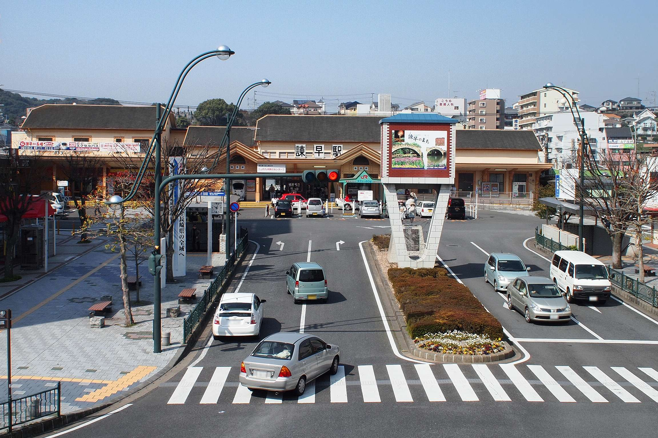 JR長崎本線、大村線、島原鉄道線の諫早駅の駅舎と駅前広場。